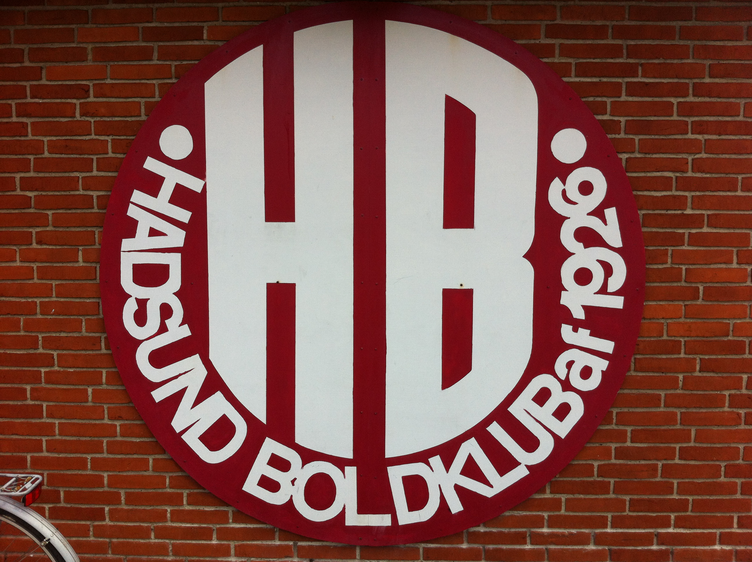 9560 Hadsund på Stadionvej